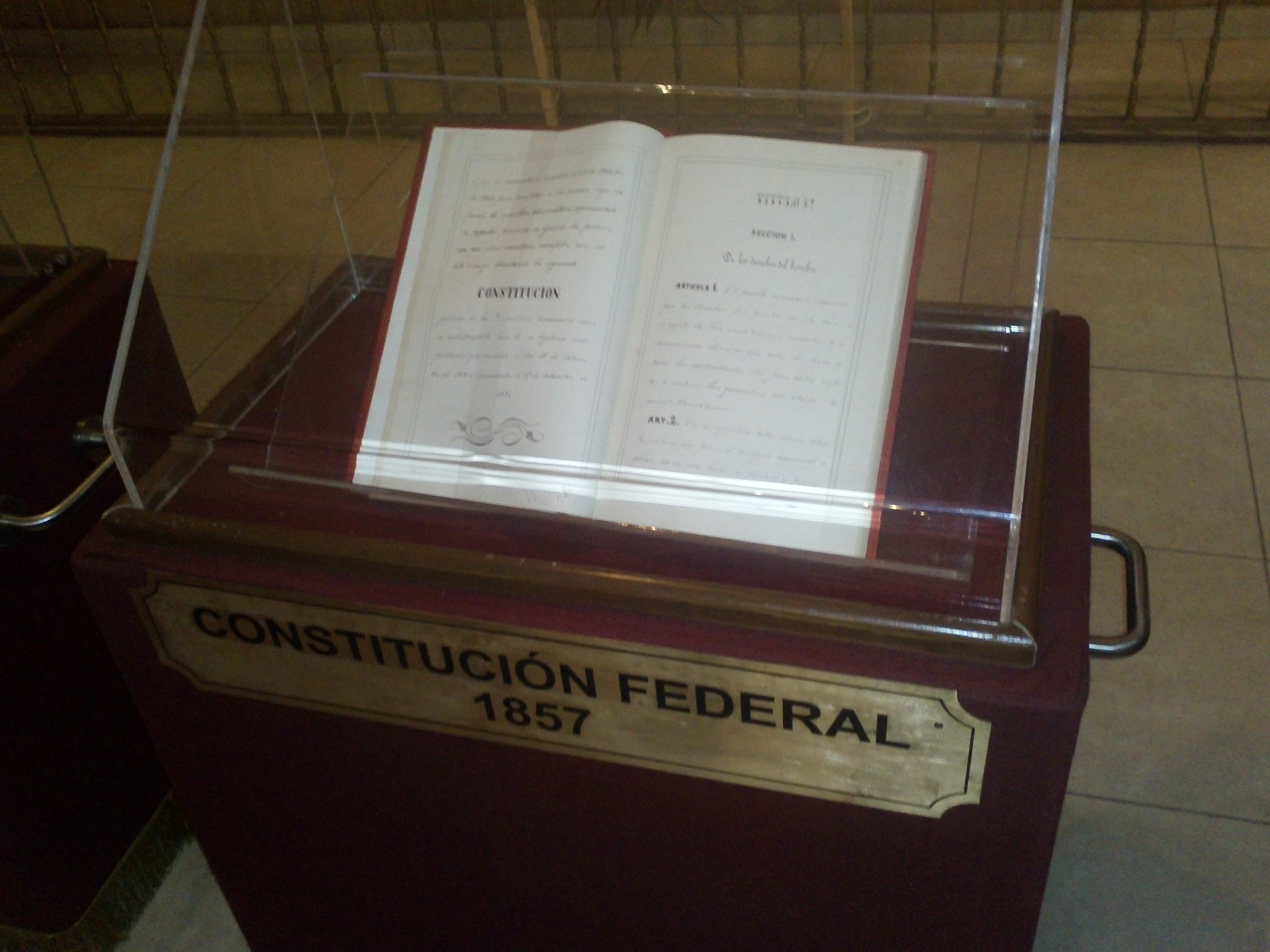 Constitución de 1857 de México